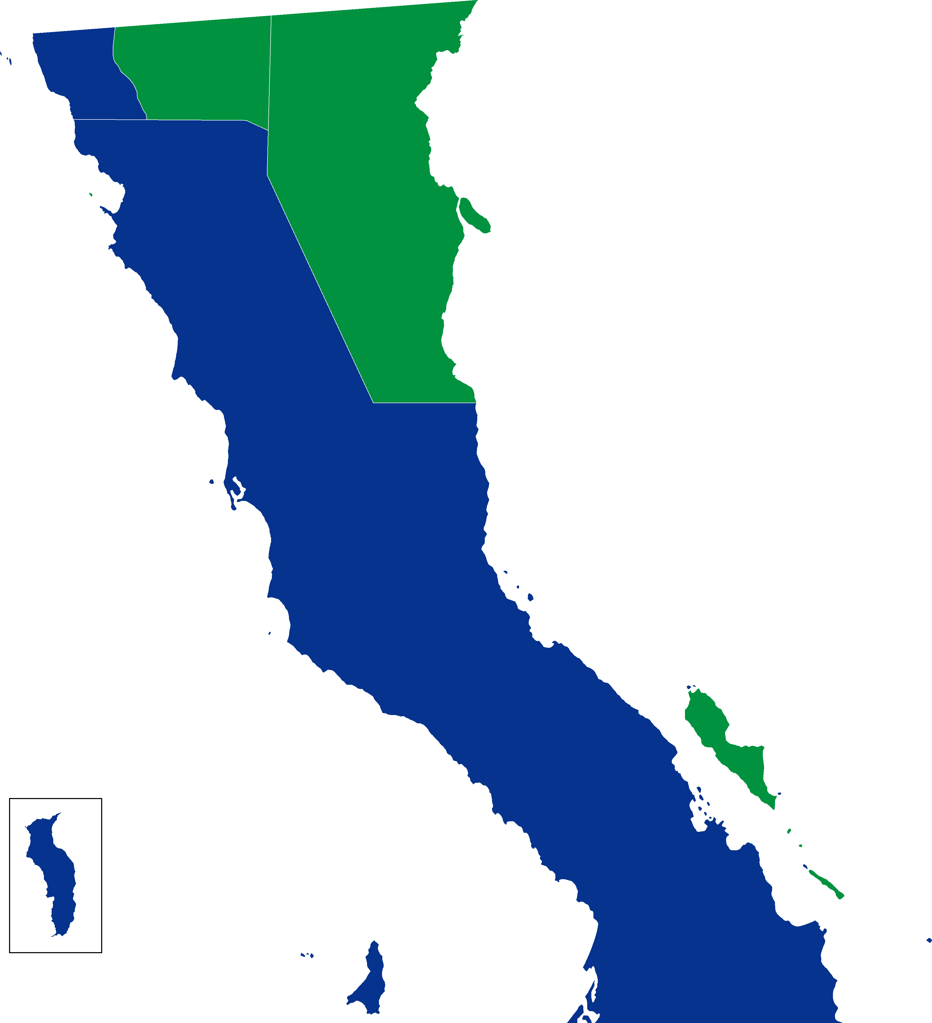 Resultados de la elección a Ayuntamientos por partido político en el estado de Baja California, México en 1989